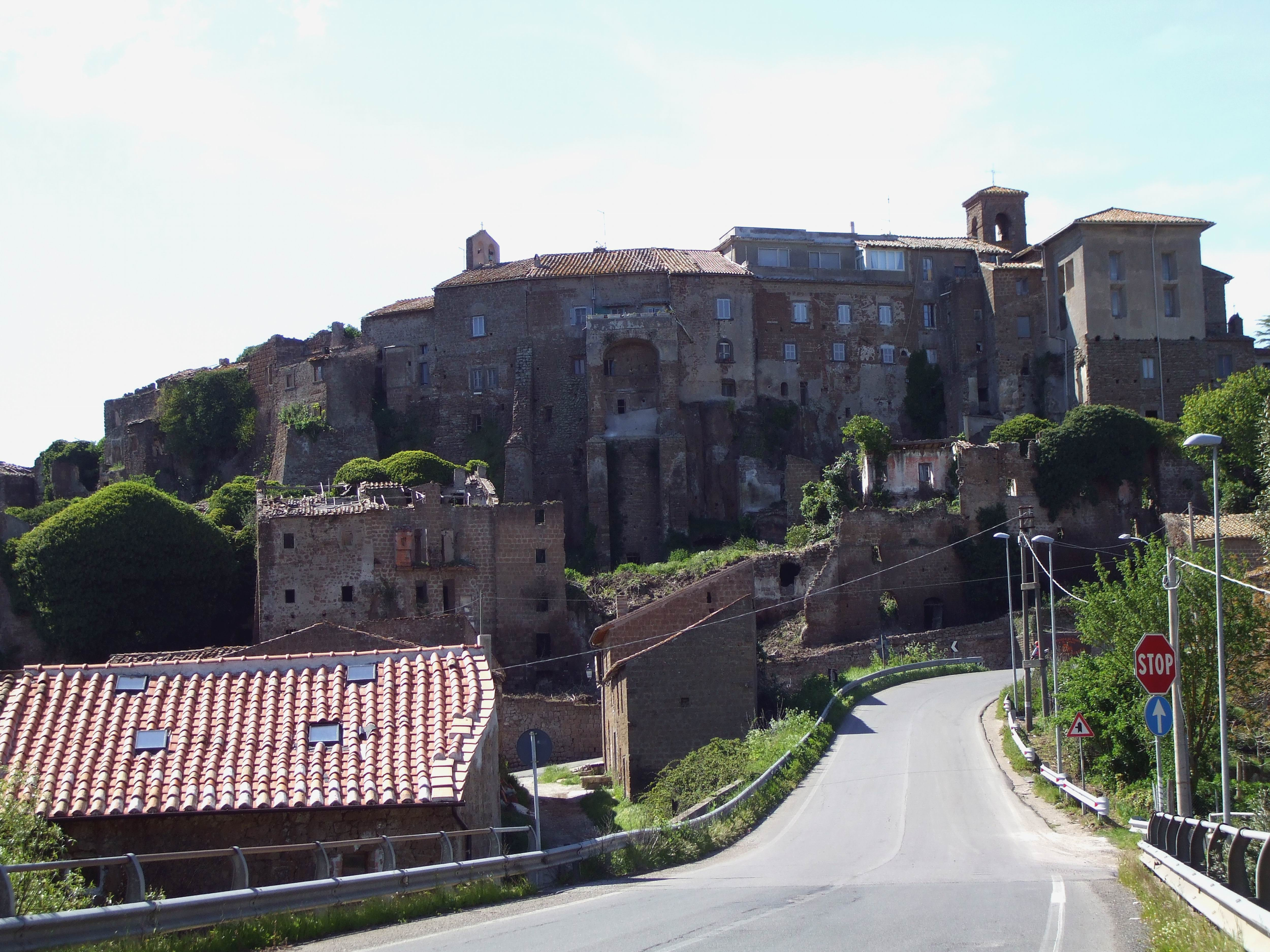 Vejano - VT